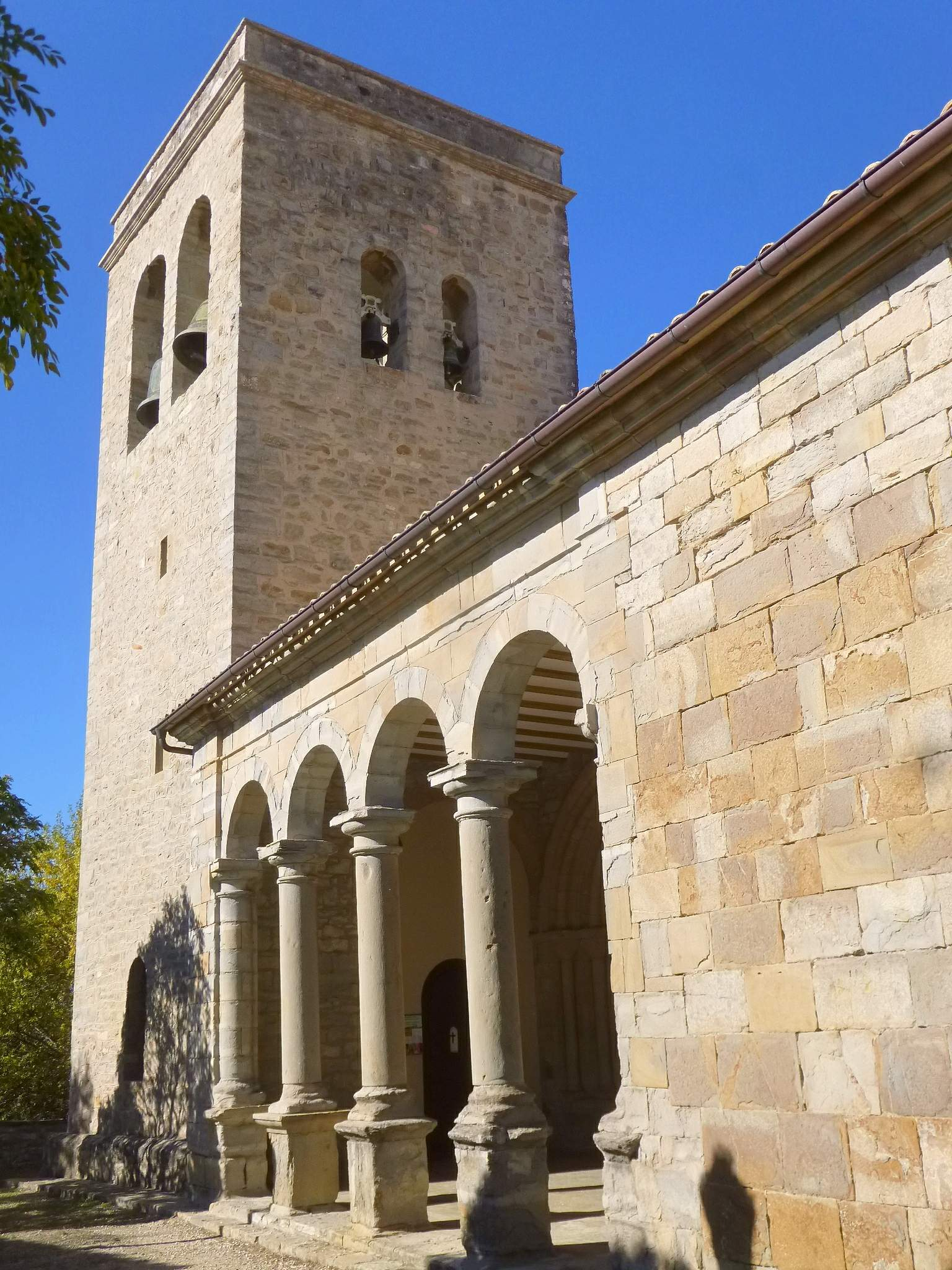 Iglesia de San Miguel (Orkoien, Navarra)